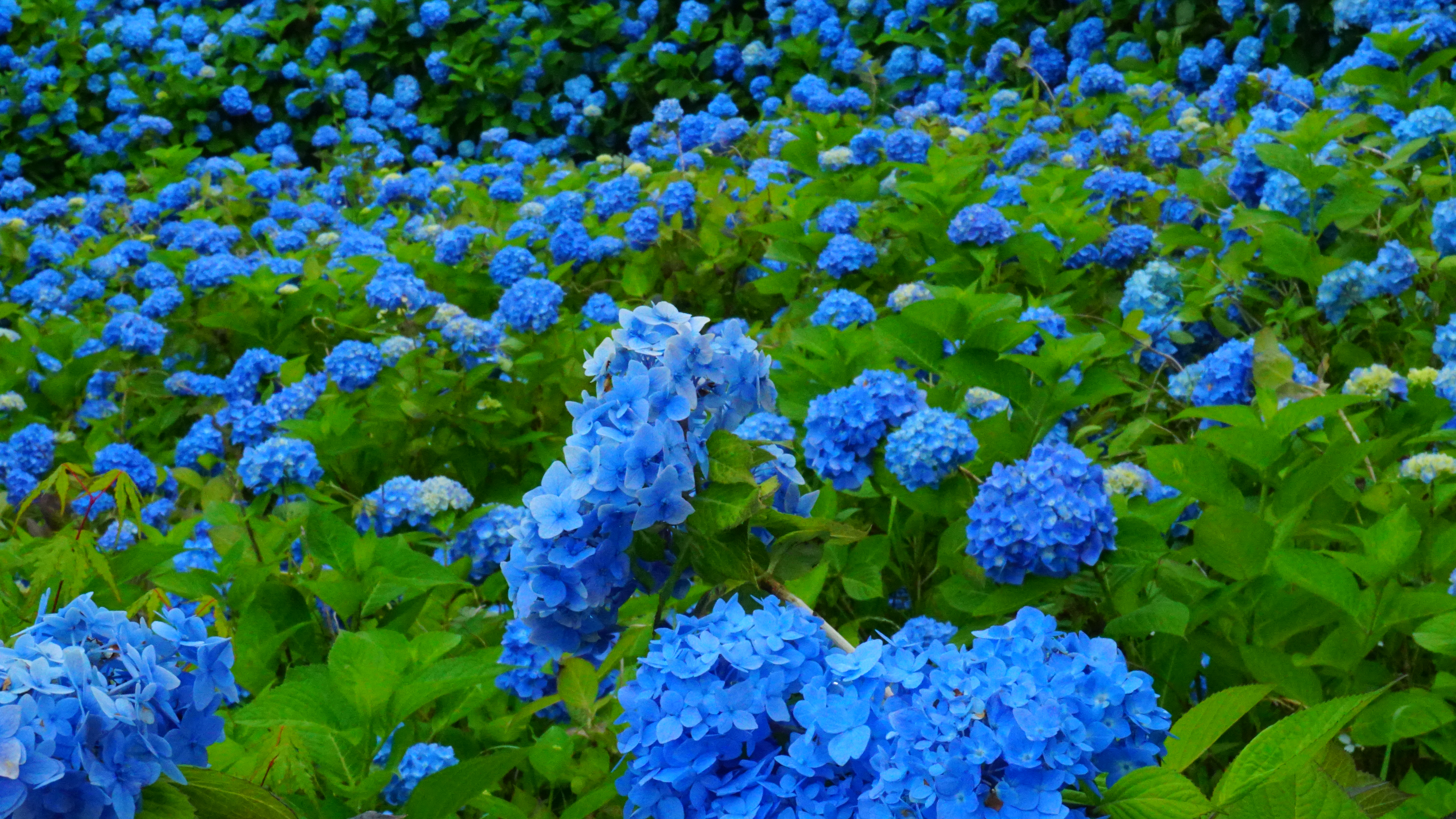 秋田県男鹿市、雲昌寺のアジサイ。6月下旬から7月上旬にかけての見頃には境内の一面が青に染まる。